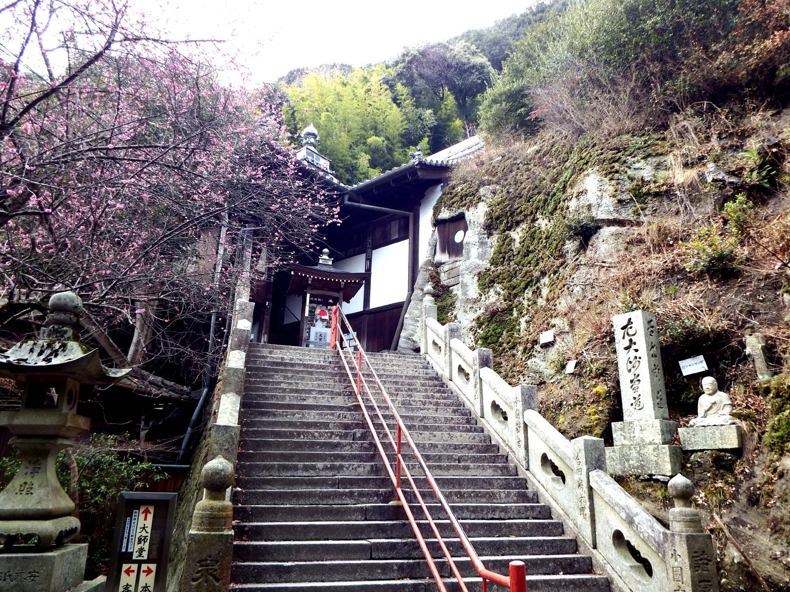 弥谷寺の大師堂